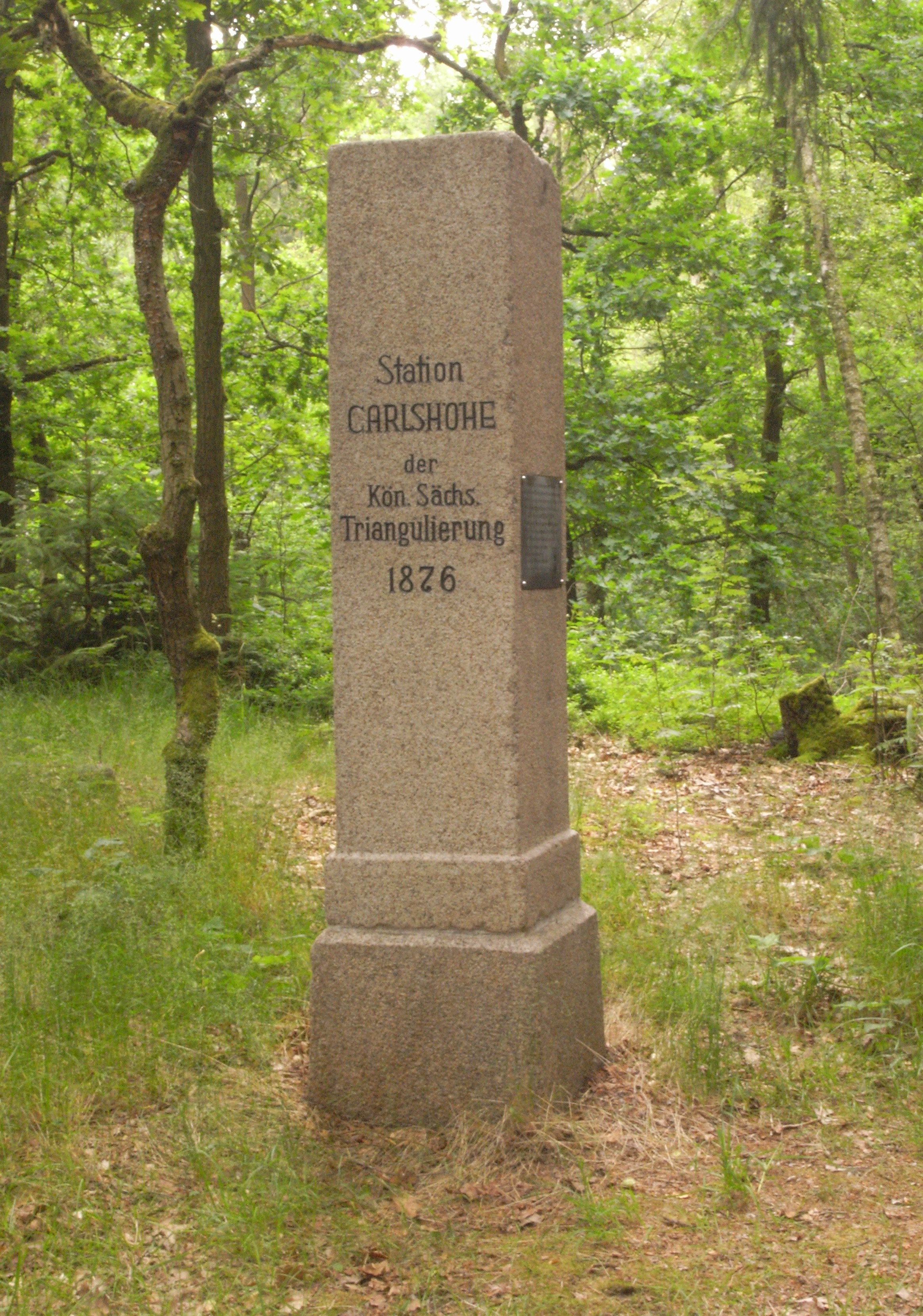 Trigonometrischer Punkt 2. Ordnung Nr. 138 der Königlich-Sächsischen Triangulirung auf der Karlshöhe bei Reichenbach/Vogtland, OT Cunsdorf (Sachsen, Deutschland)